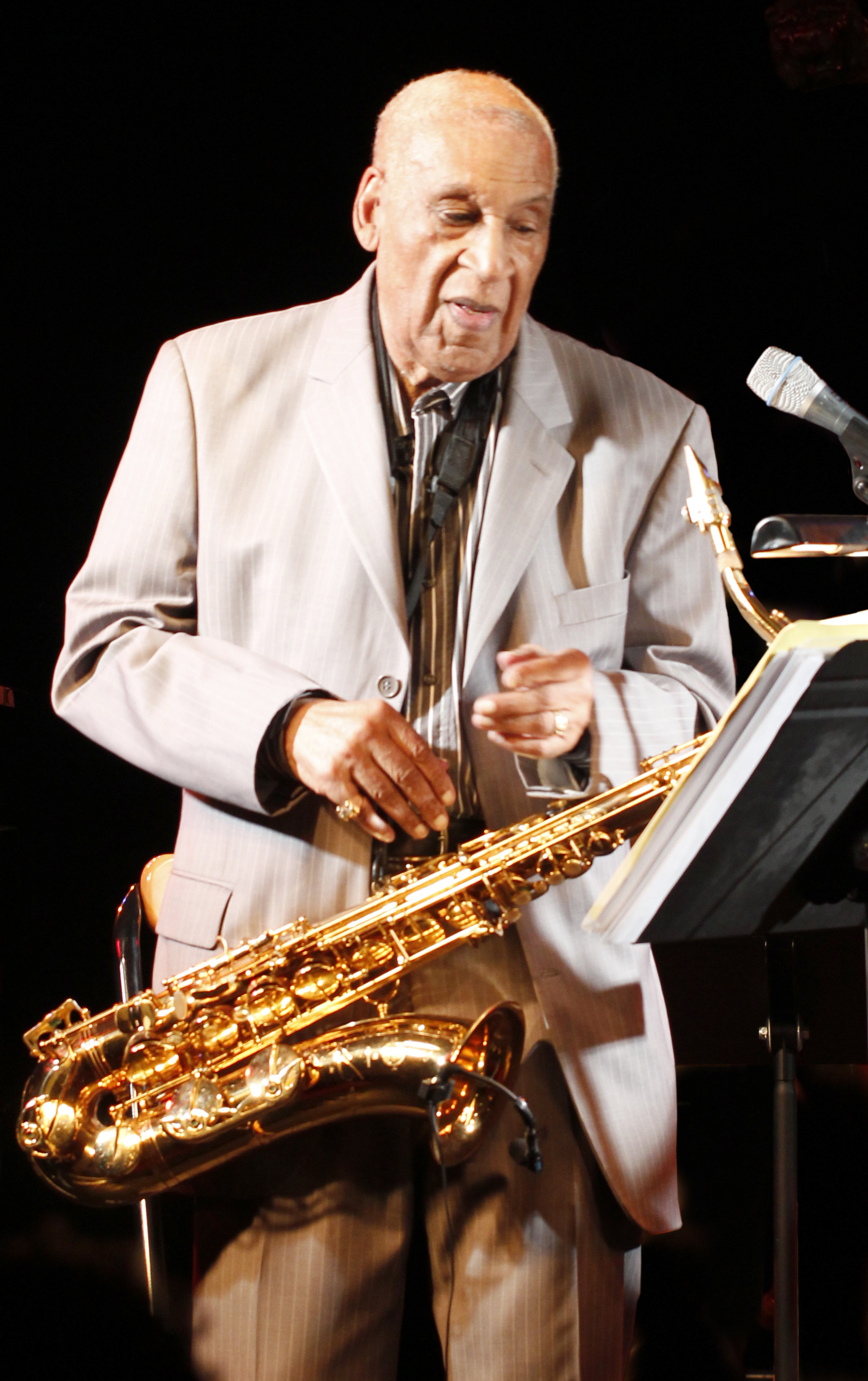 Harold Singer en concert 2012